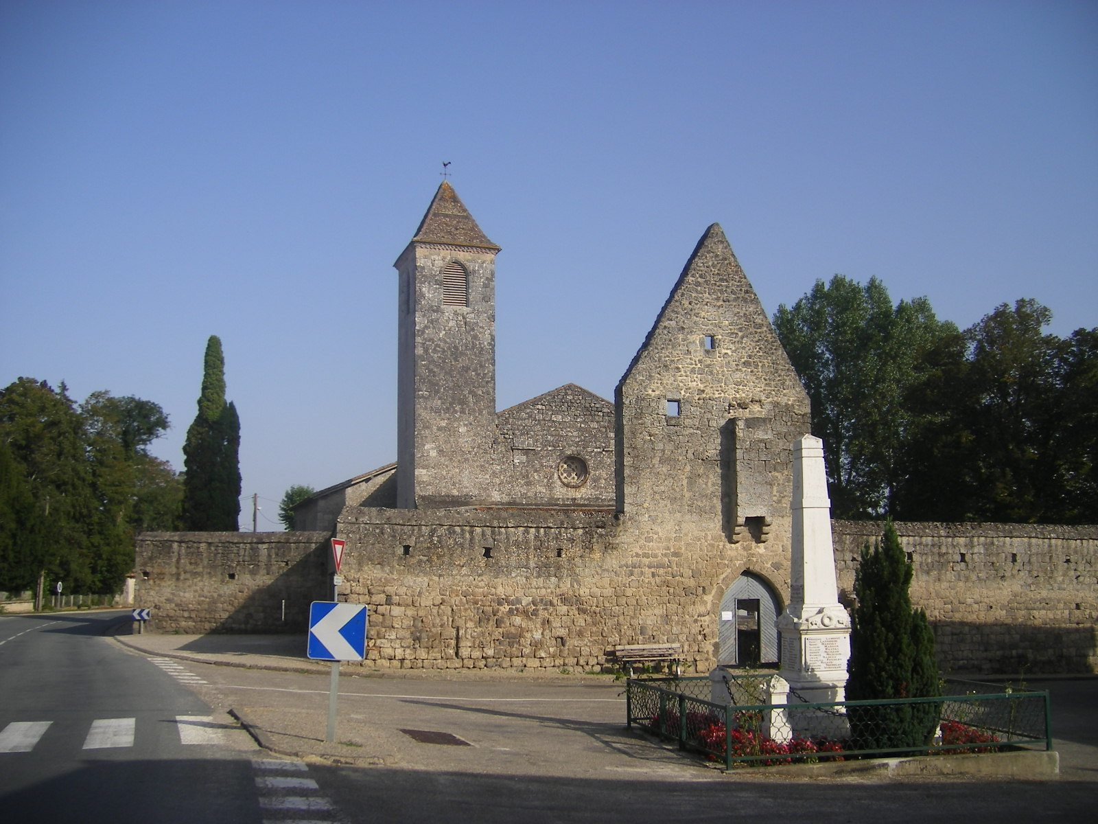 Église de Fargues-sur-Ourbise .